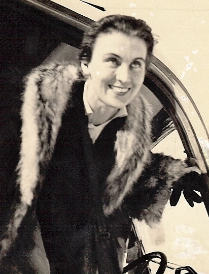 Andrée Martinerie